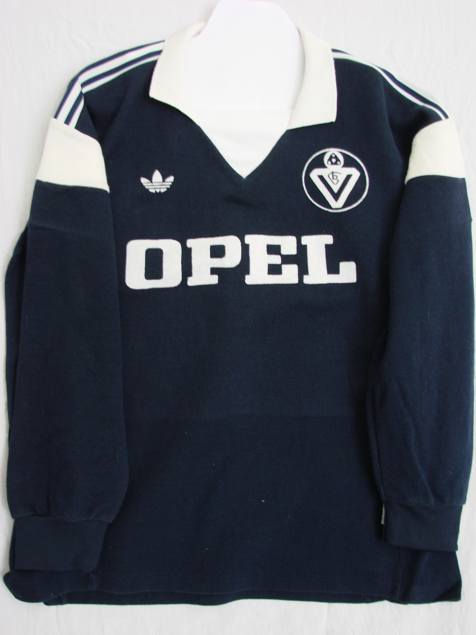 Maillot des Girondins de Bordeaux de 1985